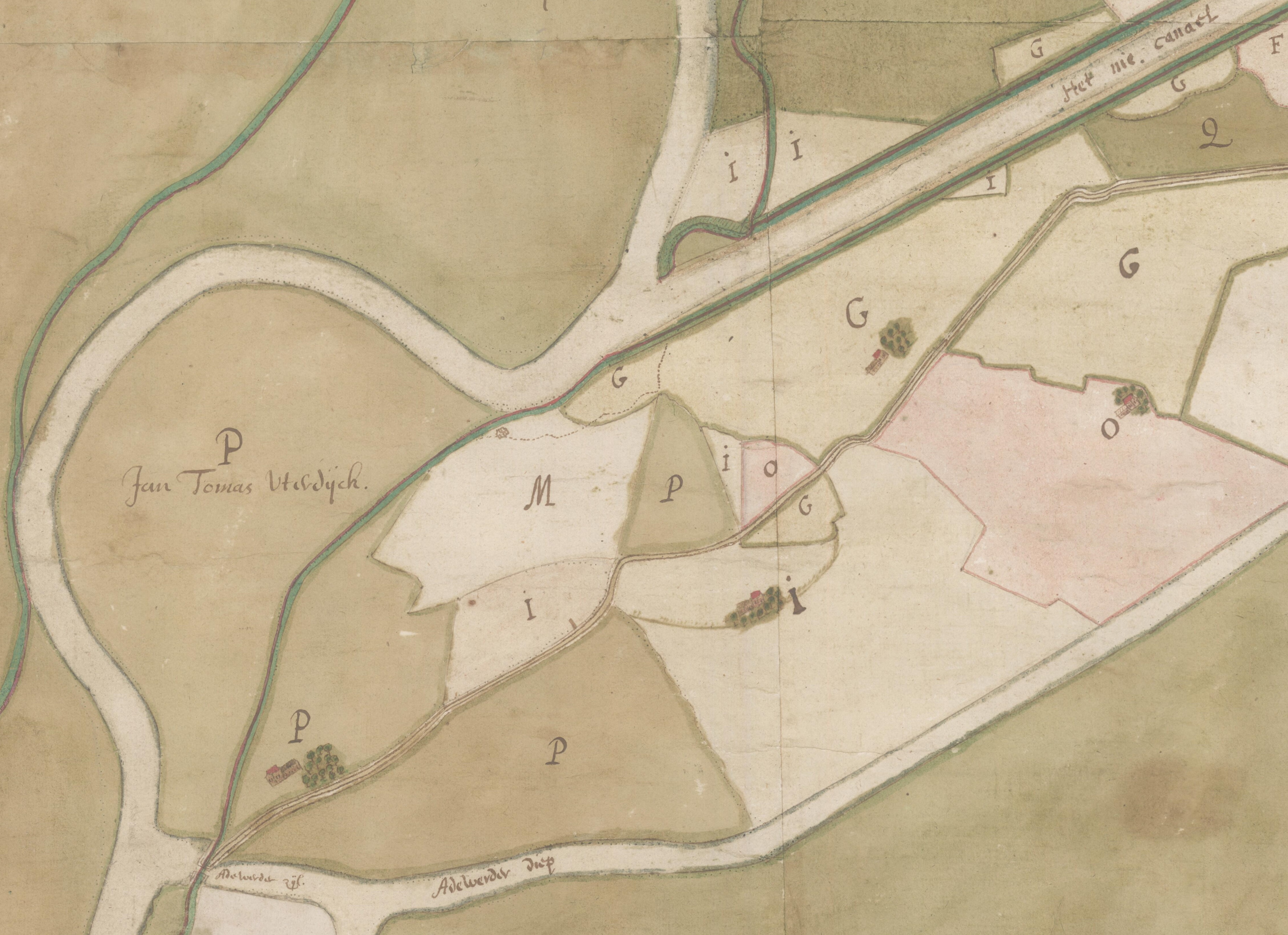 Kaart van de wierde Antum en omgeving. Links de Aduarderzijlen en rechts de weg naar Garnwerd. Fragment van File:Coucheron - kaart van de landen van het karspel Garnwerd.jpg